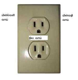 From EWiki, modified, Public Domain.